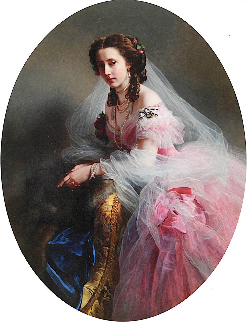 Anna Langräfin von Hessen (1836-1918), née Prinzessin von Preußen)